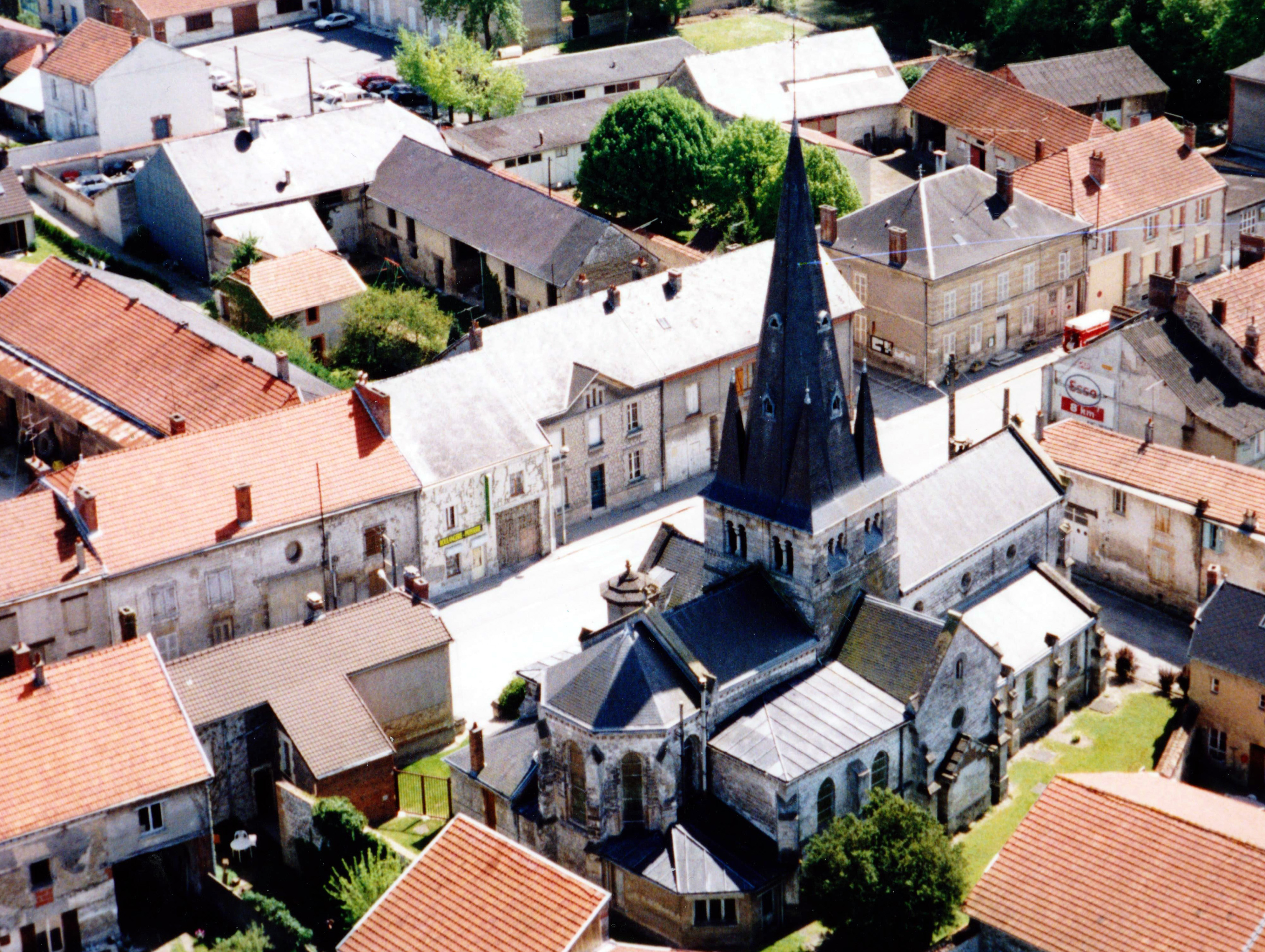 église Saint Remi d'Isles-sur-Suippe